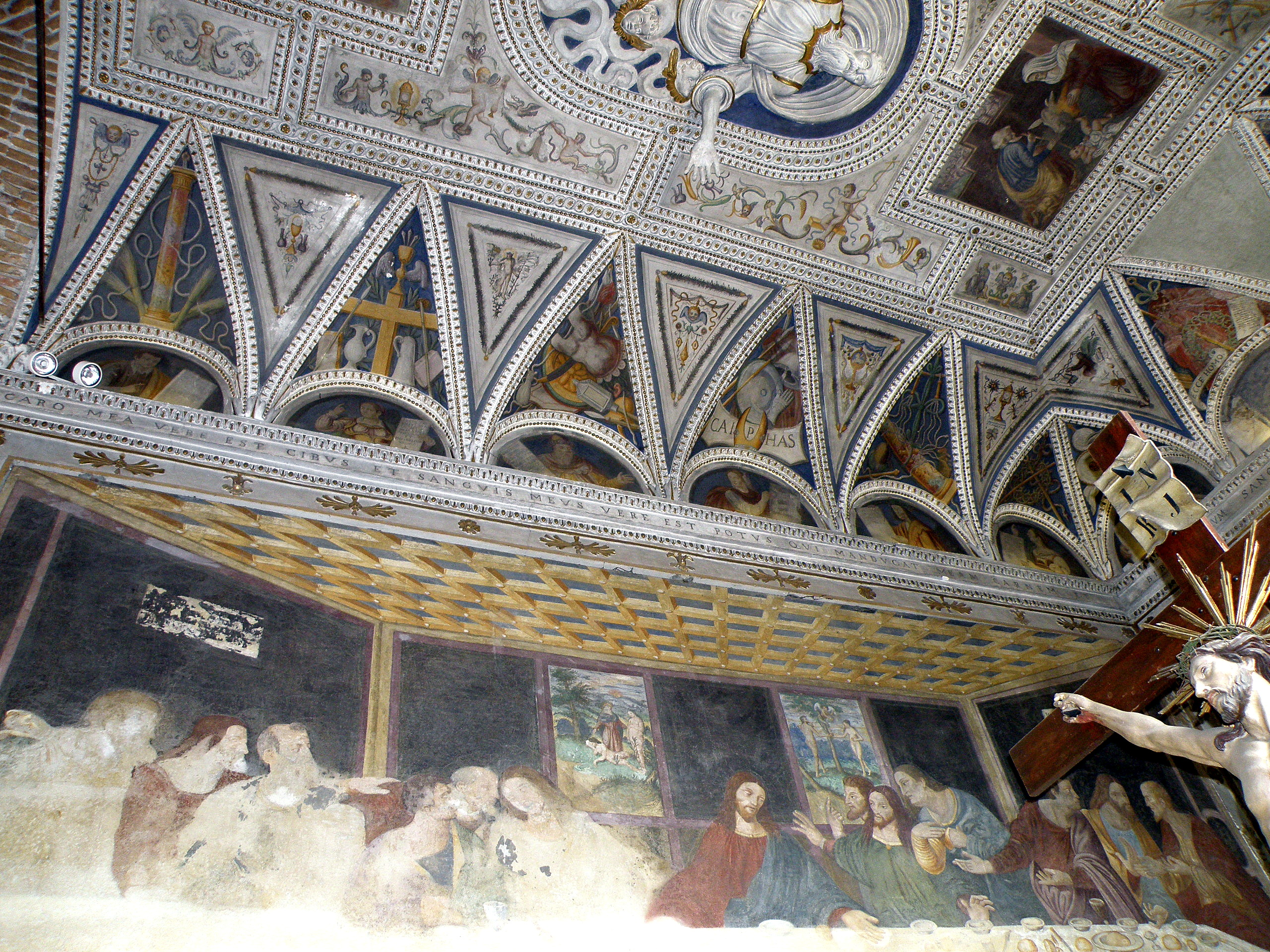 Sesto Calende (VA). Chiesa di San Donato, detta l'Abbazia, risalente al sec. IX. L´Ultima Cena, opera di Giovanni Battista Tarilli da Cureglia, datata 1581.